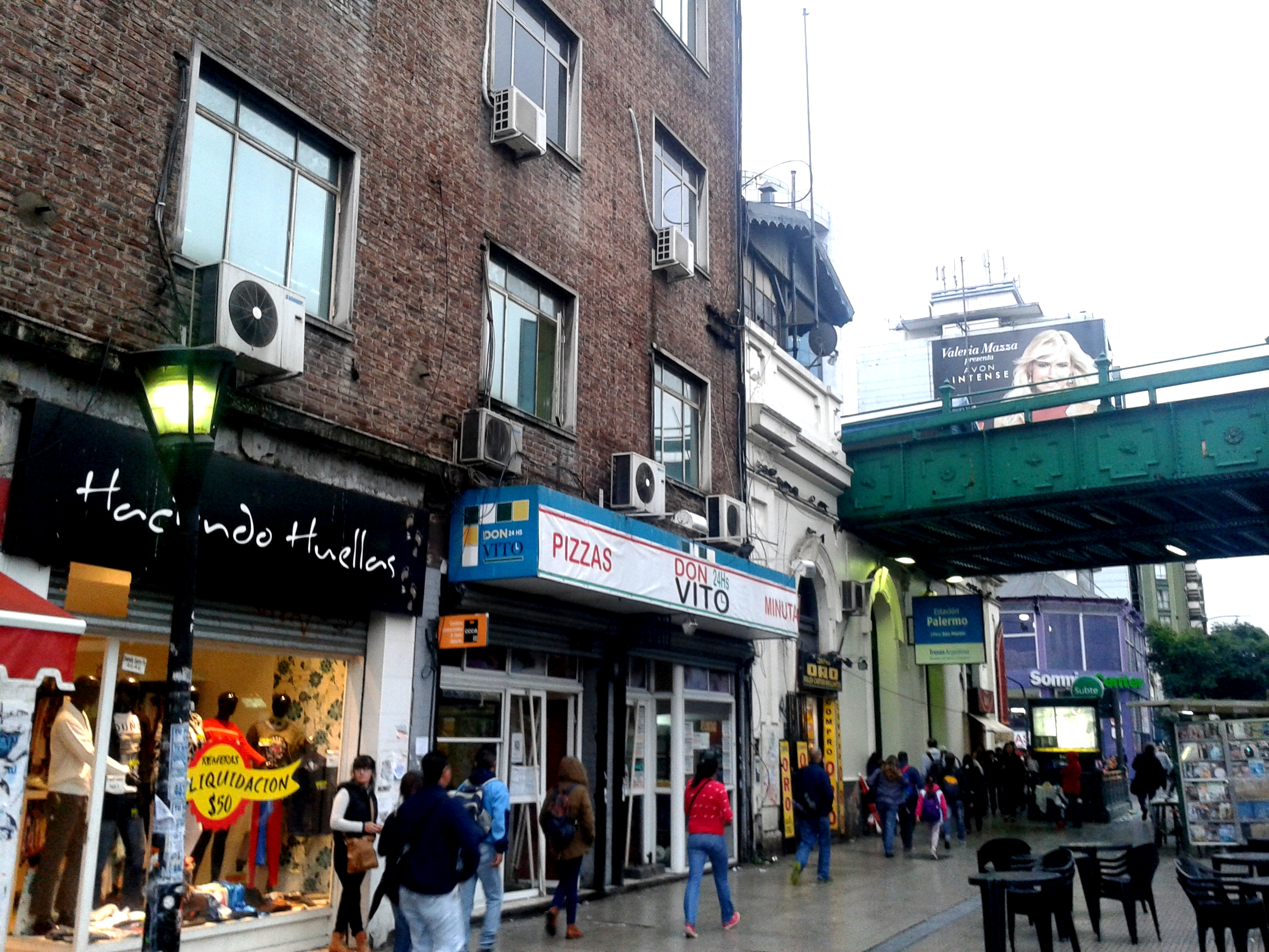 Edificio administrativo del ferrocarril, estación ferroviaria, puente Pacífico y entrada al Subte